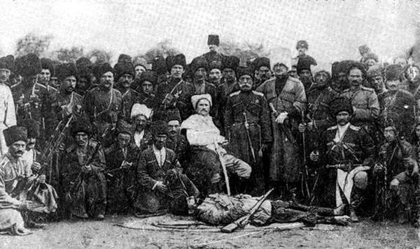 Шали.Сентябрь 1913 год.Георгий Кибиров (в центре) и карательный отряд.